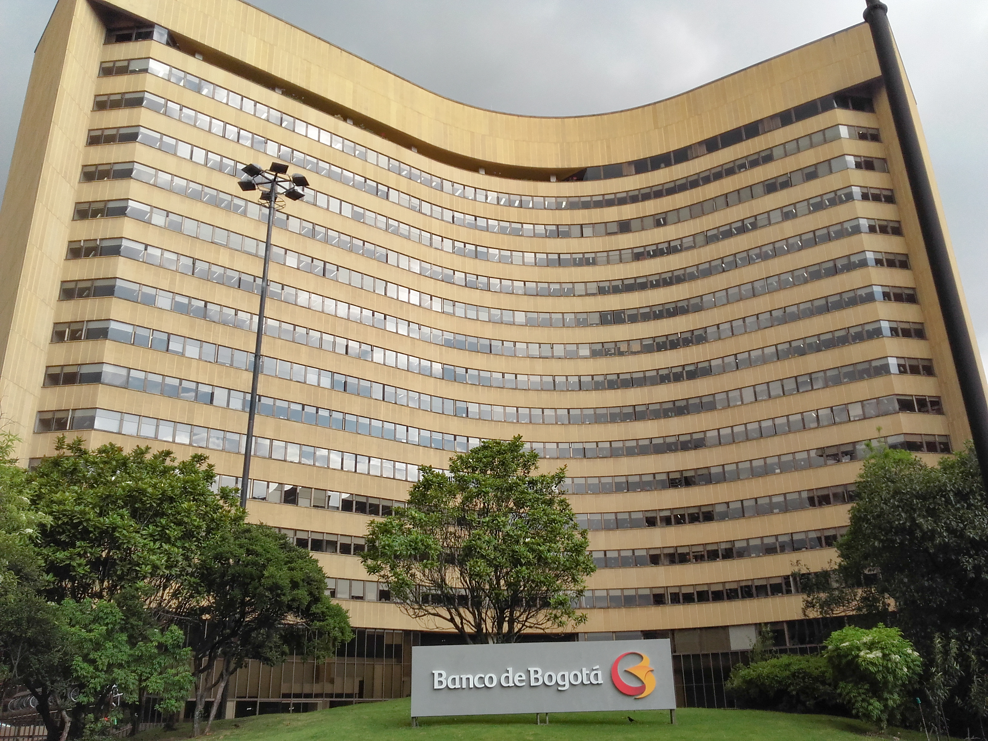 dnfnrngngn